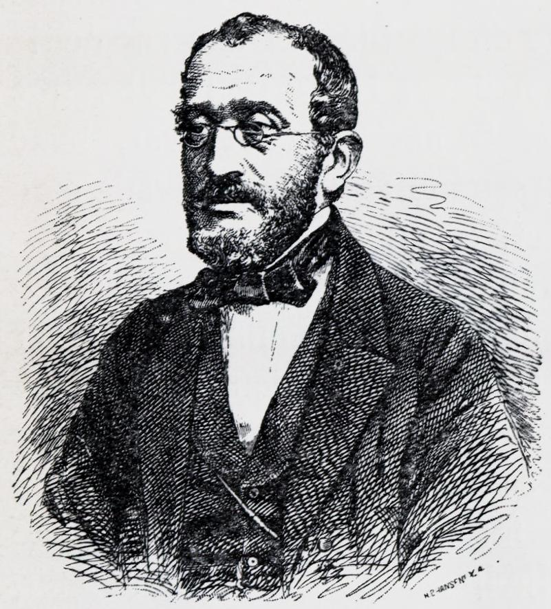 Illustrasjon hentet fra boken "En Christianiensers Erindringer fra 1850- og 60-Aarene" av Nielsen, Yngvar og utgitt av Gyldendal (Kristiania, 1910). Avbildet person: Ludvig Kristensen Daa (1809-1877)